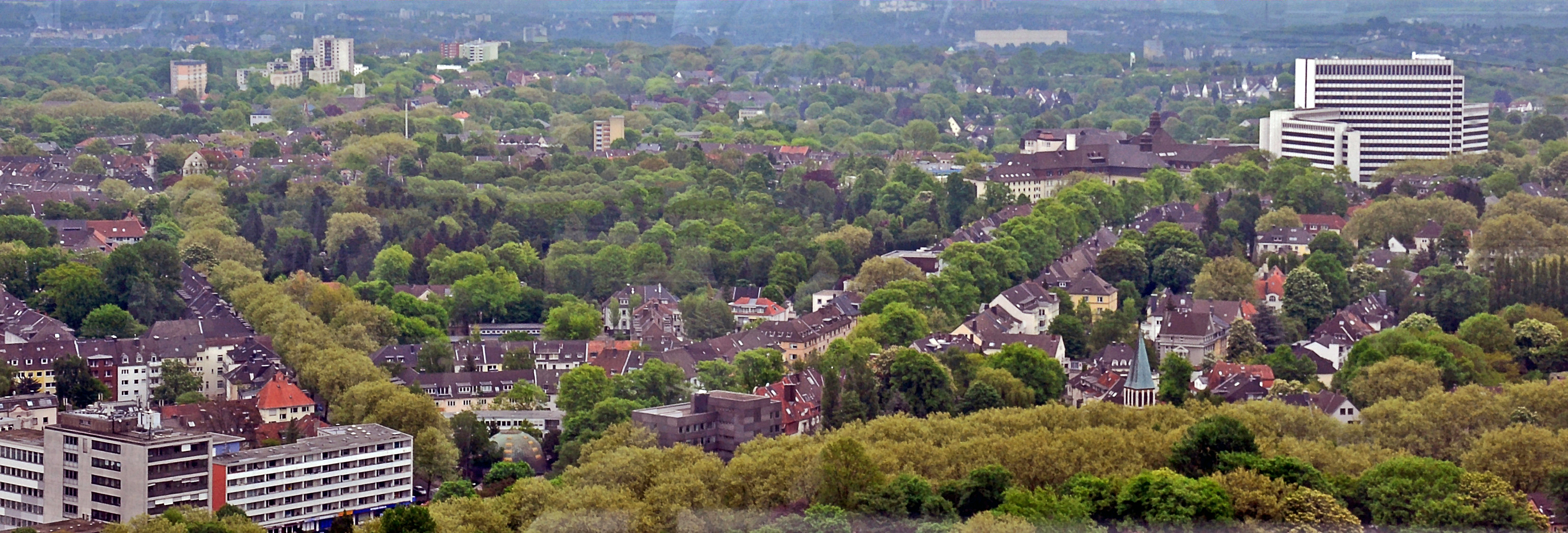 Satdtteil von Essen: Huttrop, Blick von Westen